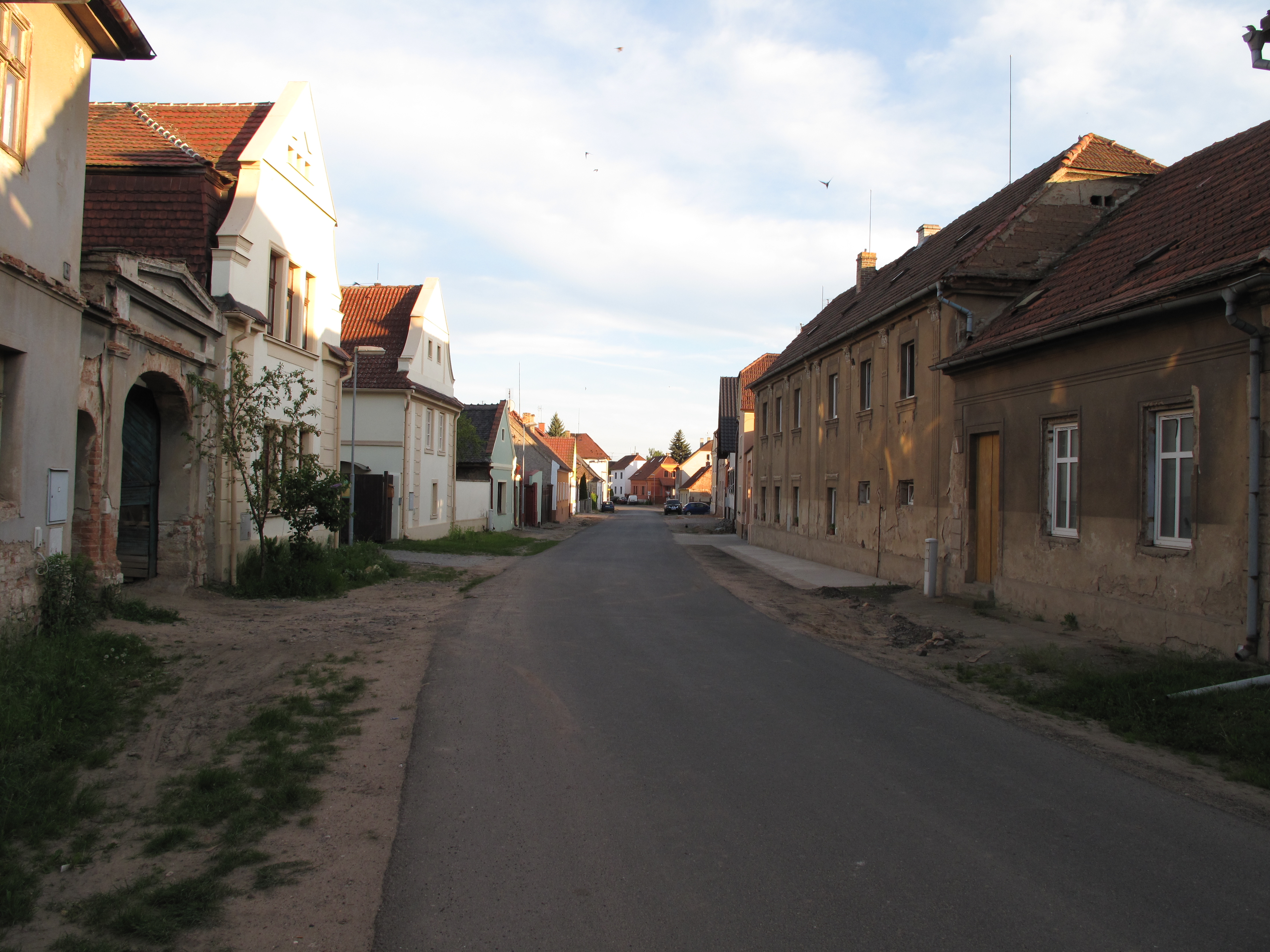 Ulice v Českých Kopistech. Okres Litoměřice, Česká republika.